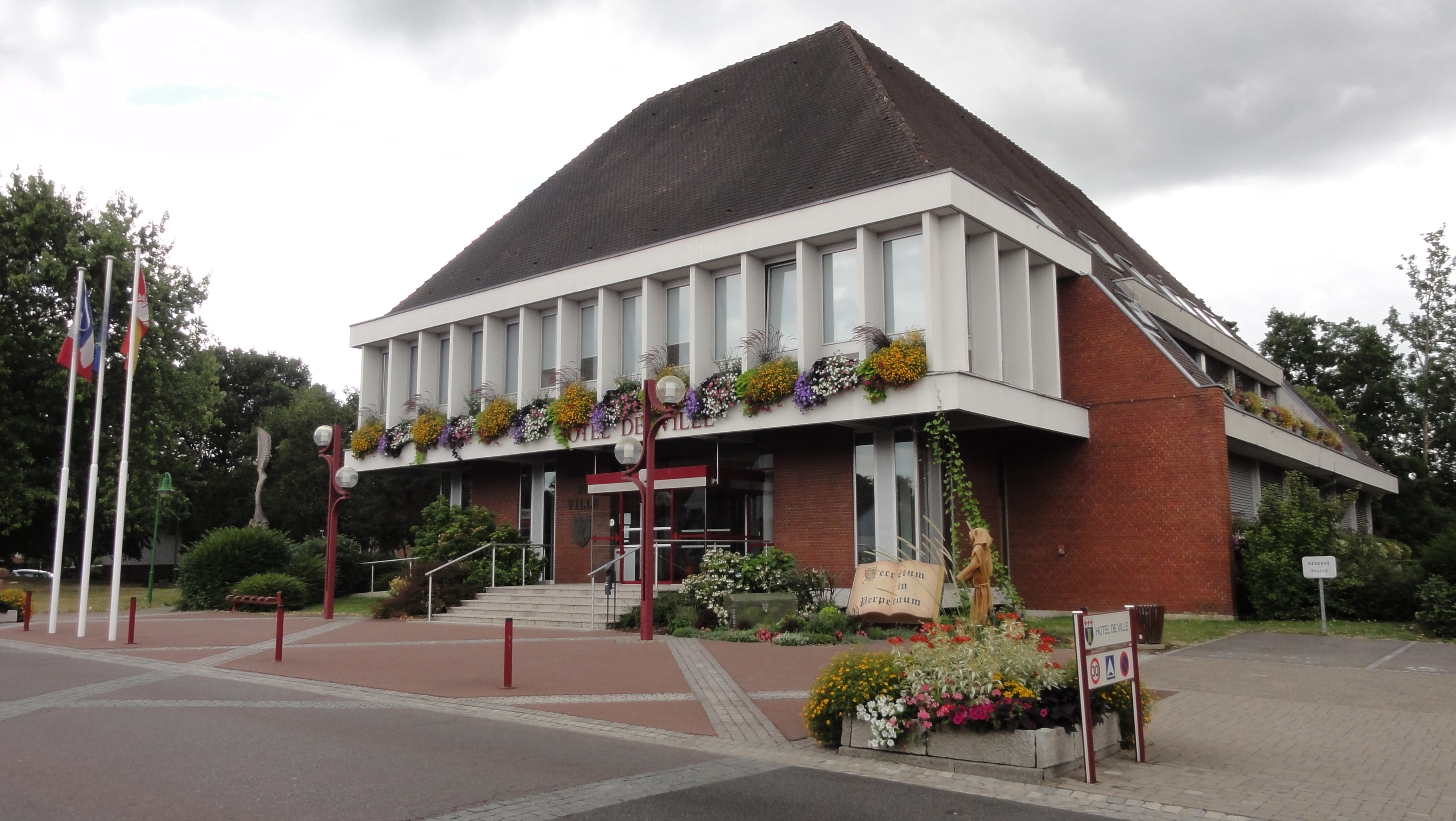 Alsace, Bas-Rhin, Reichshoffen, Hôtel de ville (XXe), 8 rue des Cuirassiers.